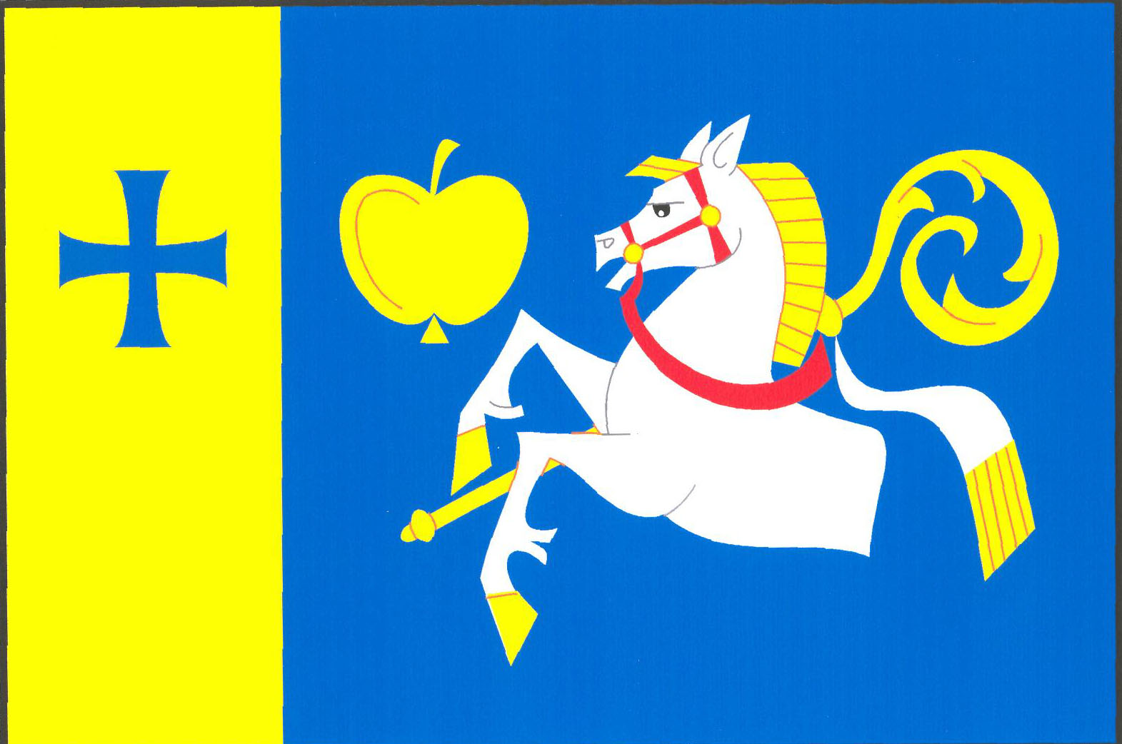 Vlajka obce Vítanov